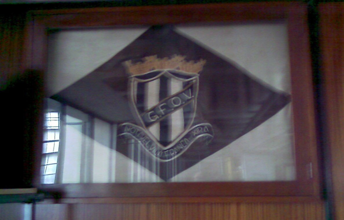 Bandeira do Grupo Foot-Ball Operário Vilafranquense exposta na sala dos troféus do União Desportiva Vilafranquense no Pavilhão José Mário Cerejo